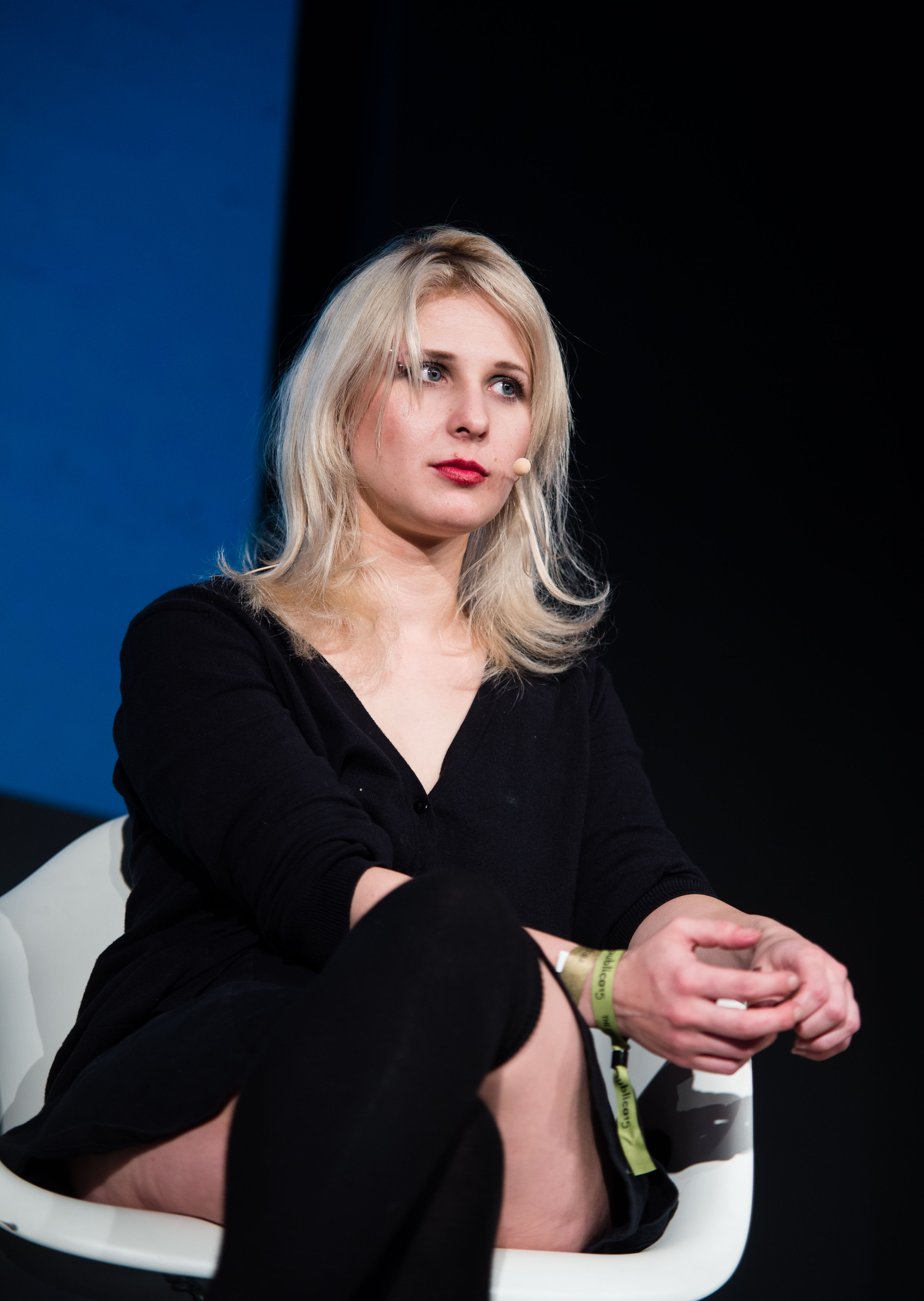 Marija Aljochina auf der re:publica 2015 am 05.05.2015 in Berlin. Copyright: re:publica/Gregor Fischer